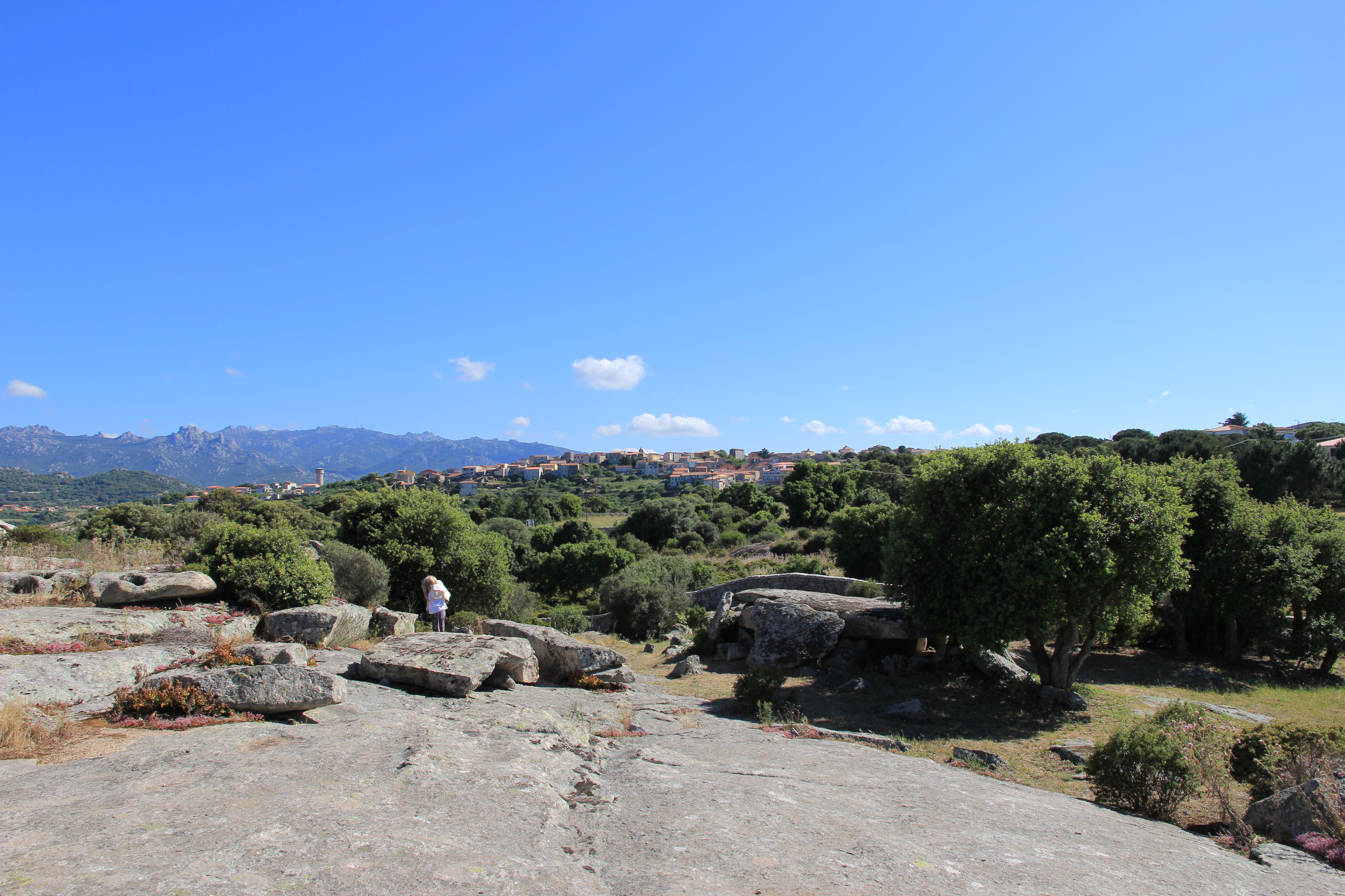 Panorama